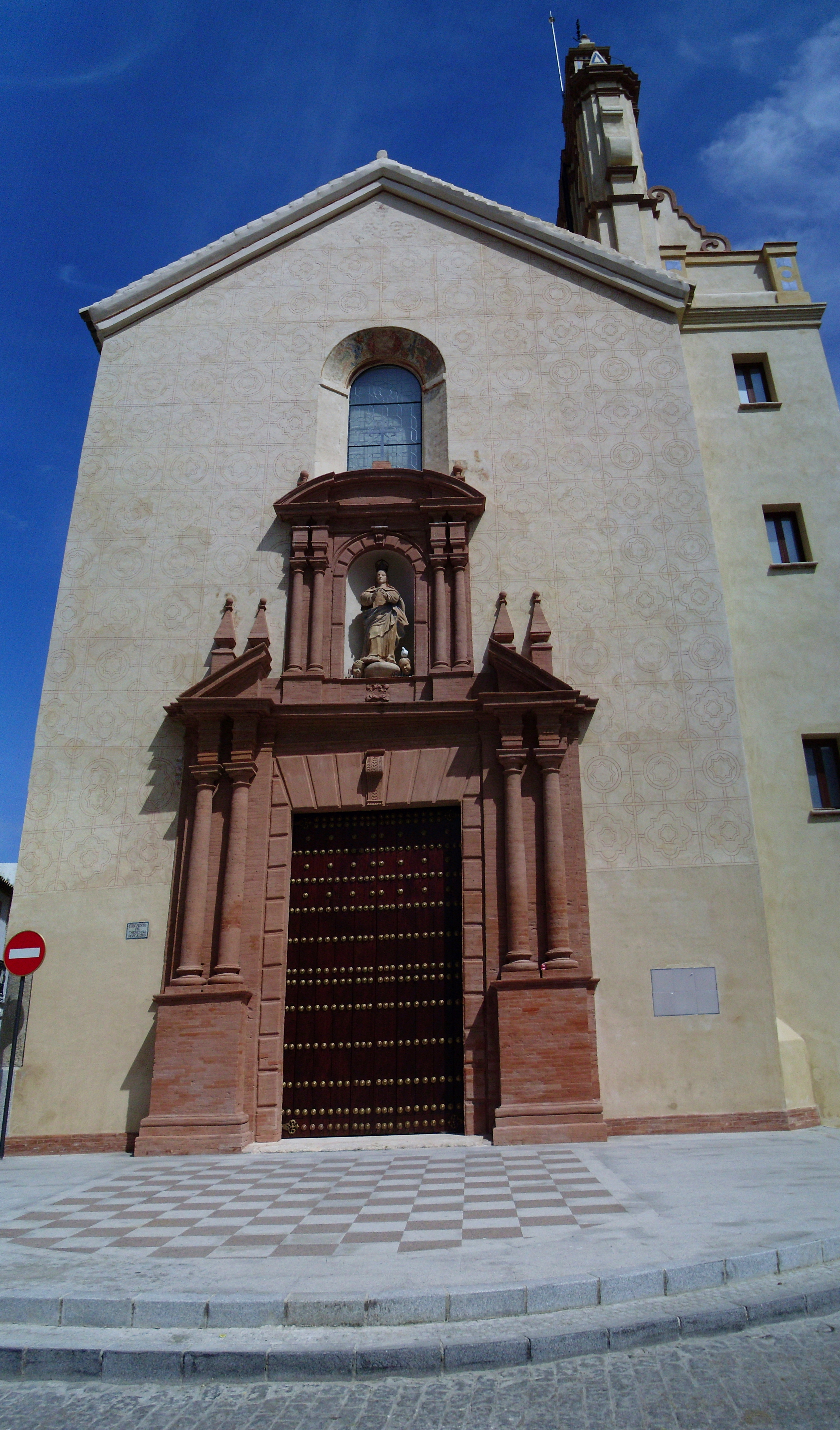 Portada de la Iglesia de los Descalzos de Écija.